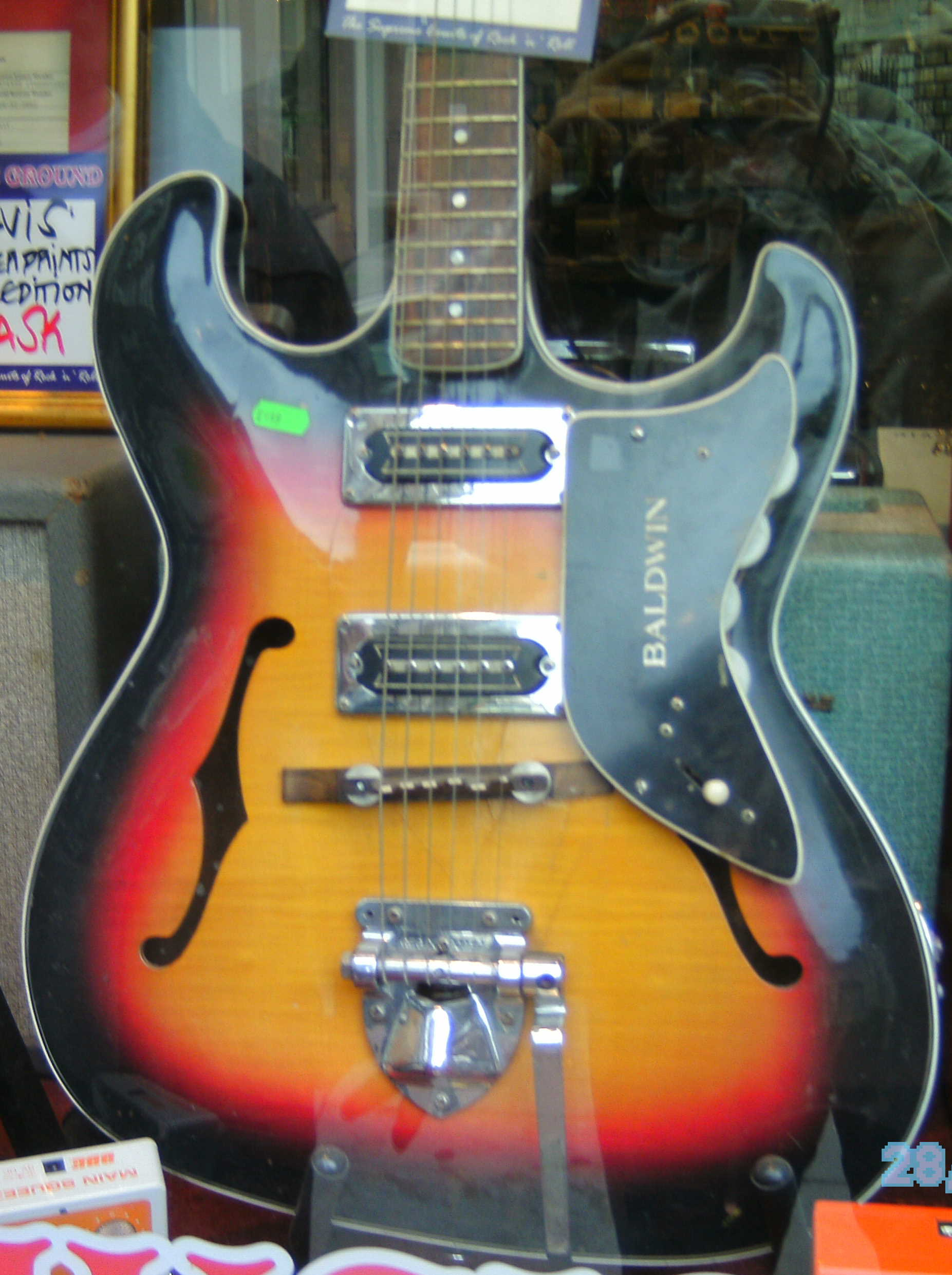 Baldwin Vibraslim Guitar, Gitarrengeschäft irgendwo in London